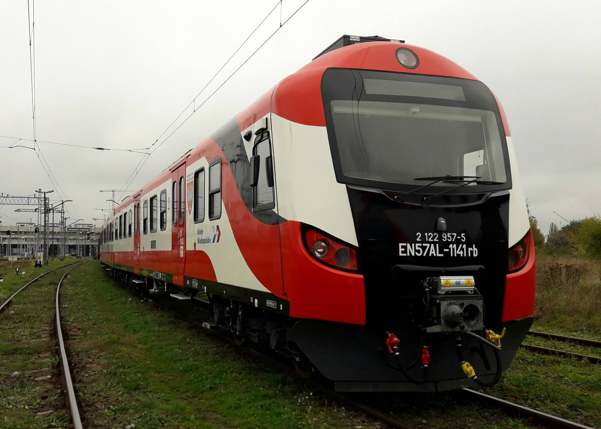 Zmodernizowany elektryczny zespół trakcyjny EN57AL-1141, eksploatowany przez Koleje Wielkopolskie, stoi na terenie stacji Poznań Główny.